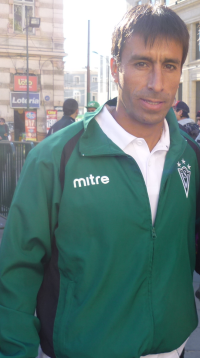 Fotografía de Moisés Villarroel, jugador de Santiago Wanderers.